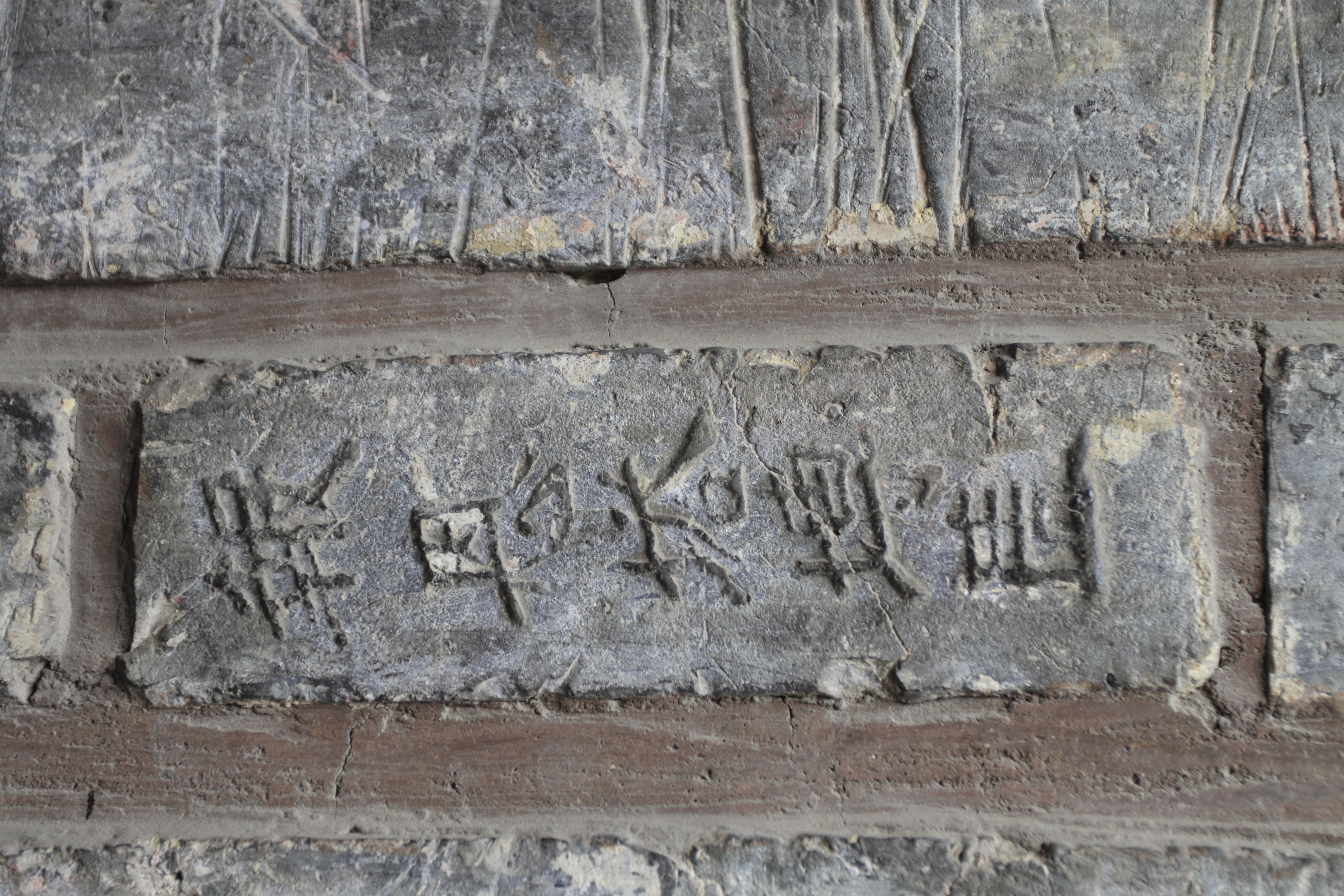 苏州报恩寺塔的铭文砖